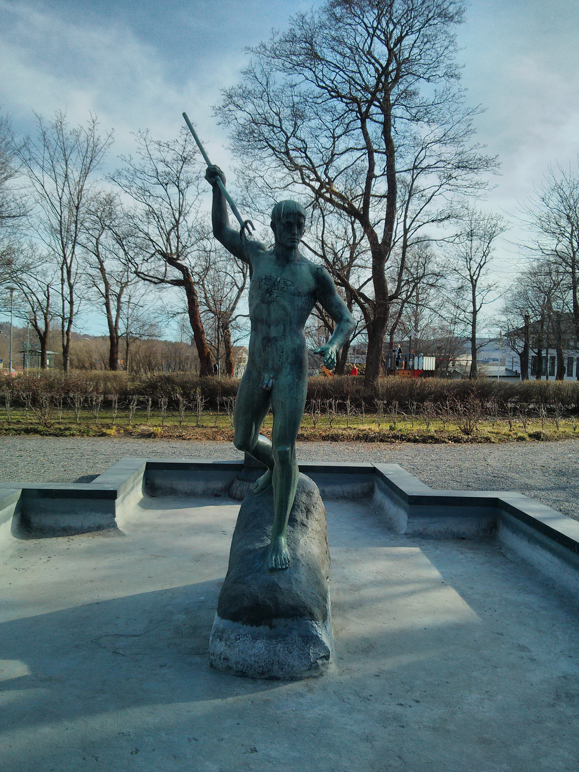 Fontänskulptur vid domkyrkan i Härnösand